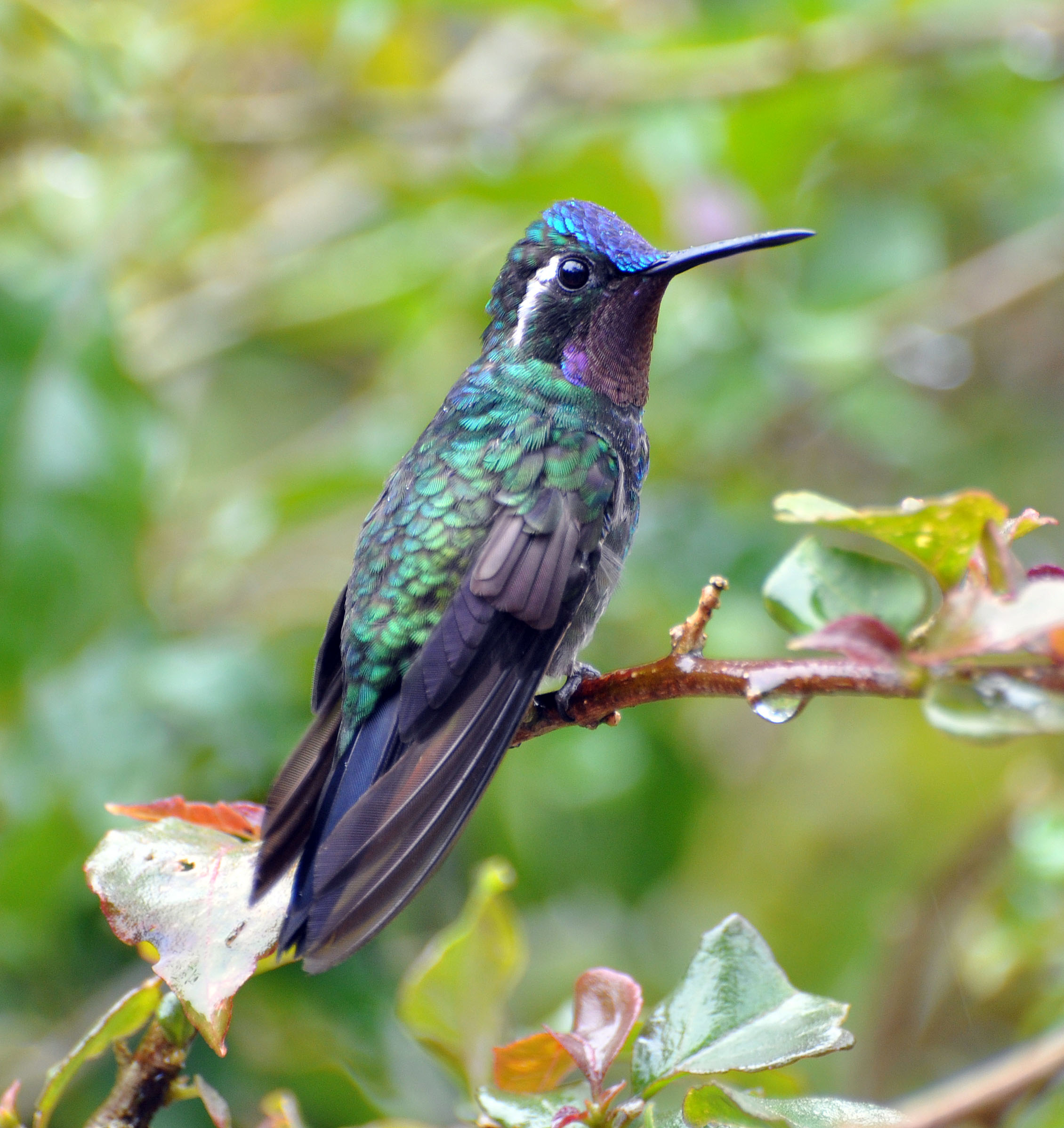 Lampornis calolaemus pectoralis 18-Mar-12 La Paz, Costa Rica